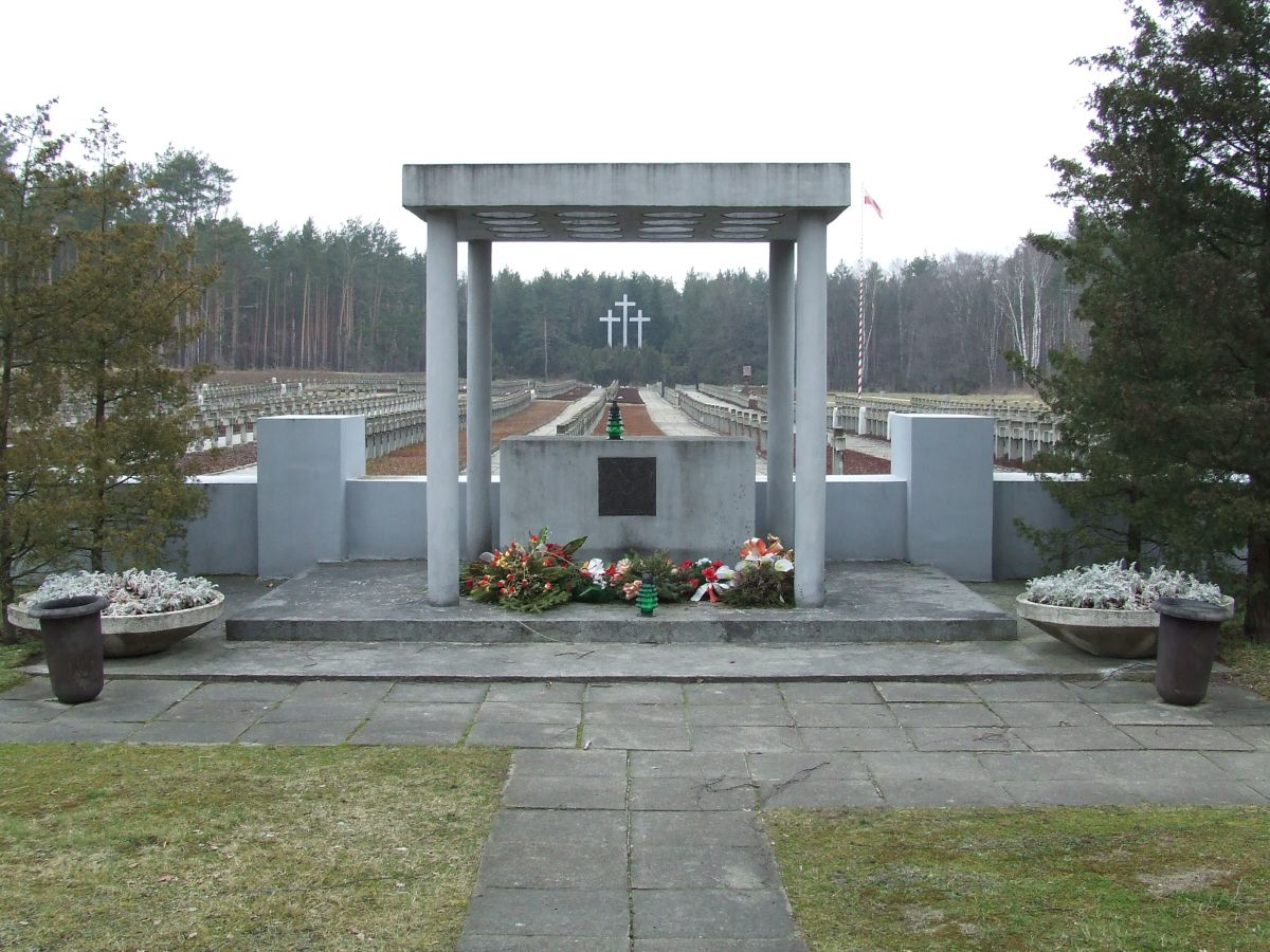 Palmiry, widok cmentarza